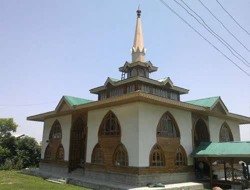 Ziyarat Baba Reshi shrine